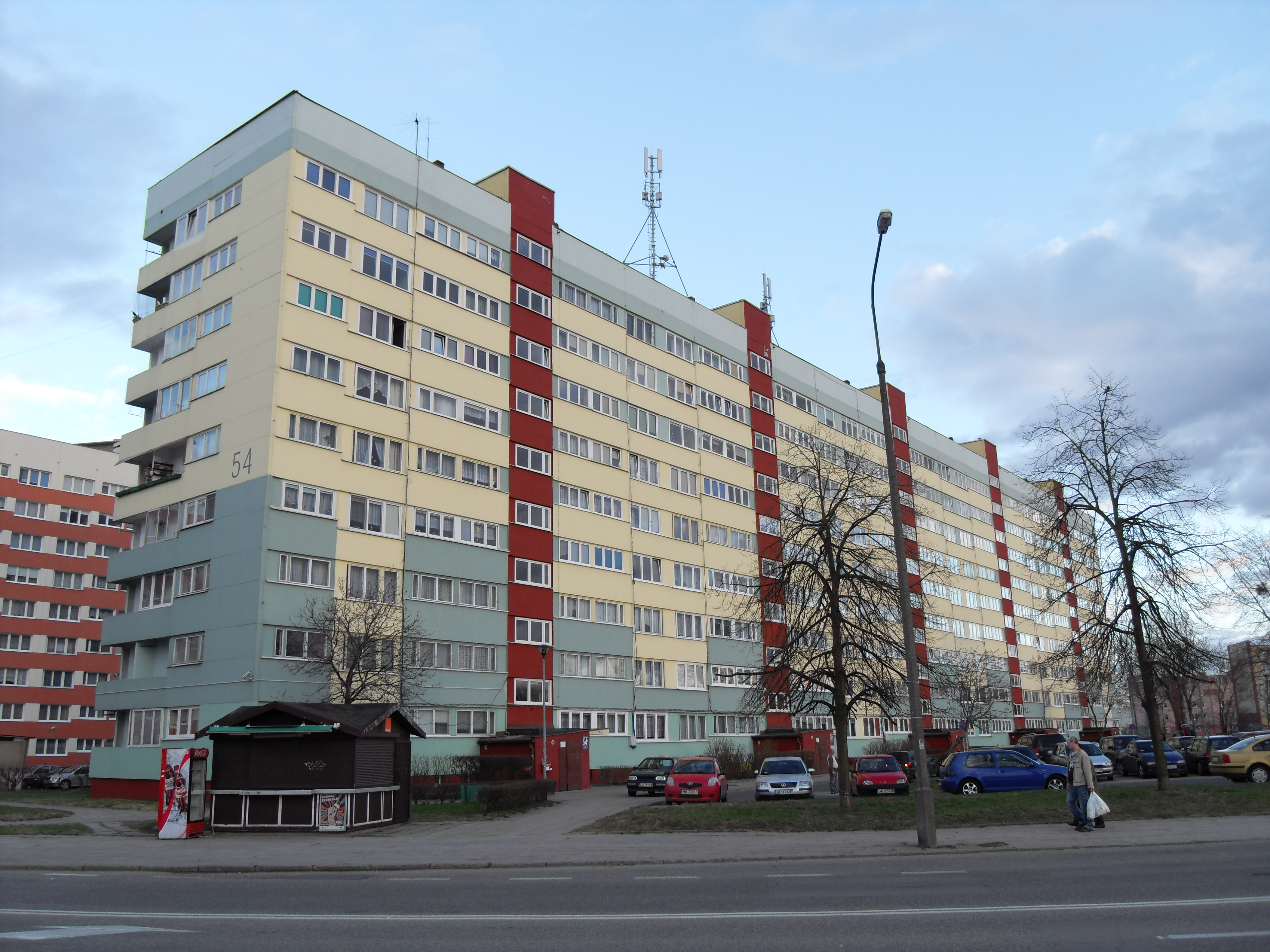 Blok leningradzki na gdańskim osiedlu Przymorze Wielkie, ul. Kołobrzeska 54.